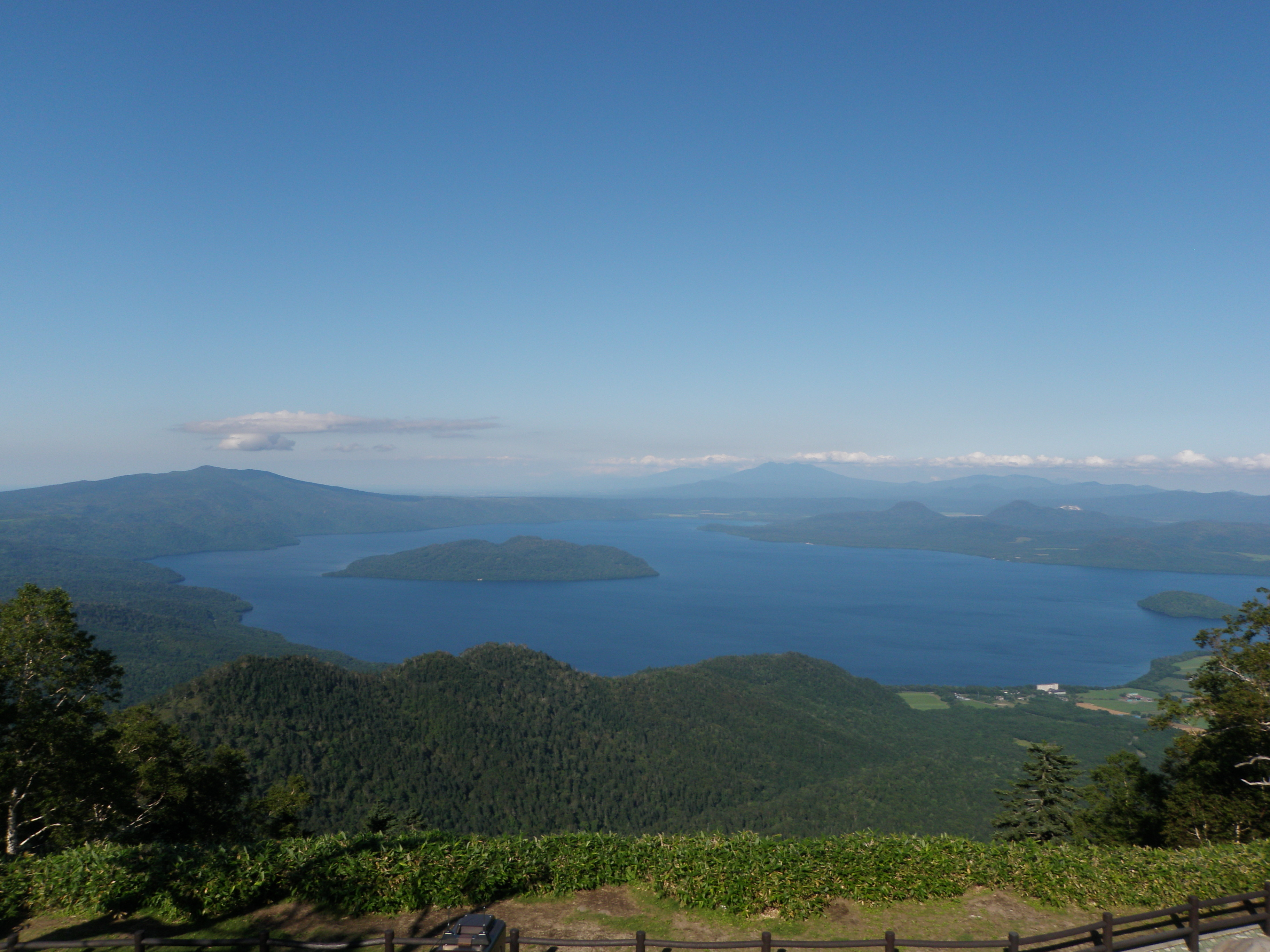 津別峠展望台より望む屈斜路湖。